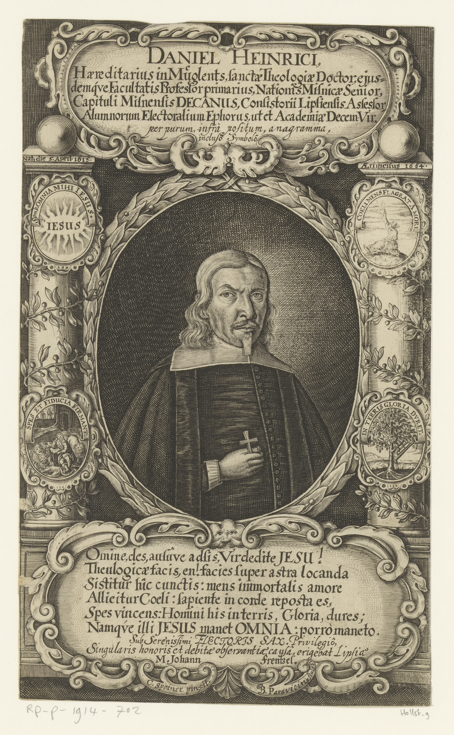 IdentificatieTitel(s): Portret van Daniel Heinrici met emblemataObjecttype: prent Objectnummer: RP-P-1914-702Catalogusreferentie: Hollstein German 9HAB A 9164Opschriften / Merken: verzamelaarsmerk, verso, gestempeld: Lugt 2228VervaardigingVervaardiger: prentmaker: Johann-Baptist Paravicini (vermeld op object)naar schilderij van: Christoph Spetner (vermeld op object)schrijver: Johann Frentzel (vermeld op object)Datering: 1656 - 1676Fysieke kenmerken: gravureMateriaal: papier Techniek: graveren (drukprocedé)Afmetingen: blad: h 265 mm (binnen de plaatrand afgesneden) × b 161 mm (binnen de plaatrand afgesneden)OnderwerpWat: historical personscrucifix ~ personal devotionAbstract Ideas and Concepts (+ emblematical representation of concept)Wie: Daniel HeinriciVerwerving en rechtenVerwerving: aankoop 1905Copyright: Publiek domein